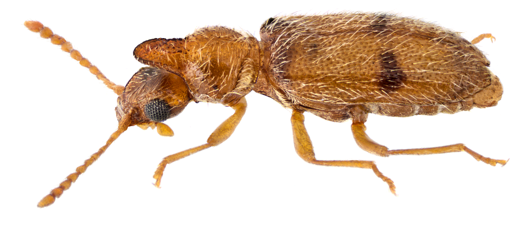 Family: Anthicidae Size: 2,7 mm Location: Gambia, Serrekunda, environment Hotel Senegambia Beach leg. U.Schmidt, 16.-22.XI.1990; det. G.Uhmann, 1996 Photo: U.Schmidt, 2015